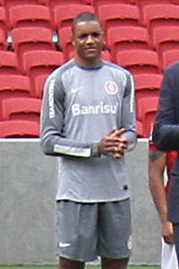 Visita da presidente Dilma Rousseff ao Beira-Rio (20 de fevereiro de 2014